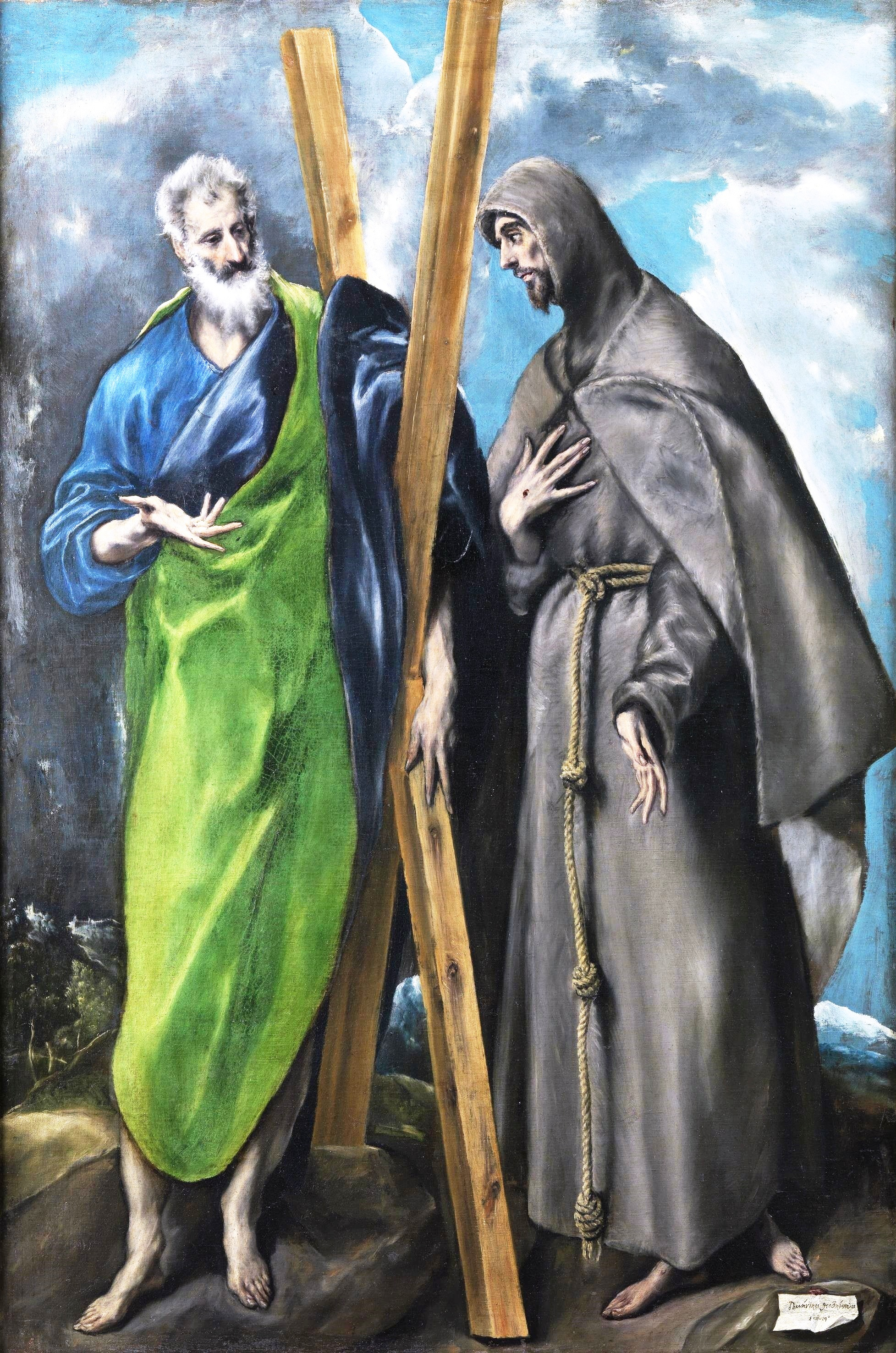 La obra representa al apóstol San Andrés, que era hermano del apóstol San Pedro, junto a San Francisco de Asís, fundador de la Orden de los franciscanos.